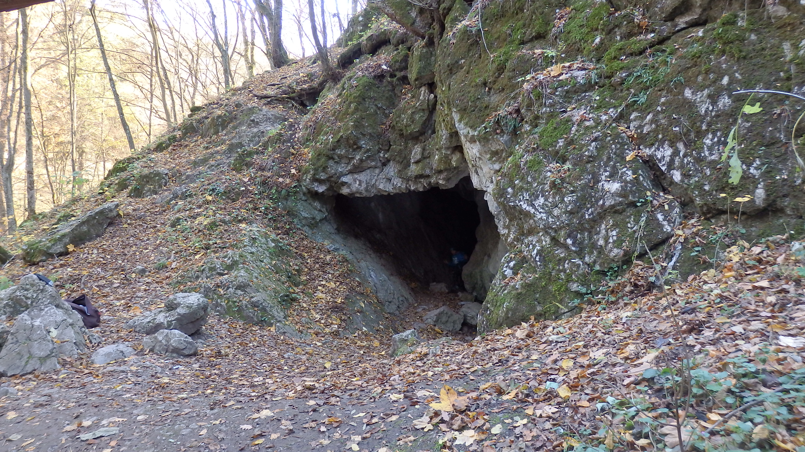 jeskyně Netopýrka, přírodní rezervace Údolí Říčky, CHKO Moravský kras